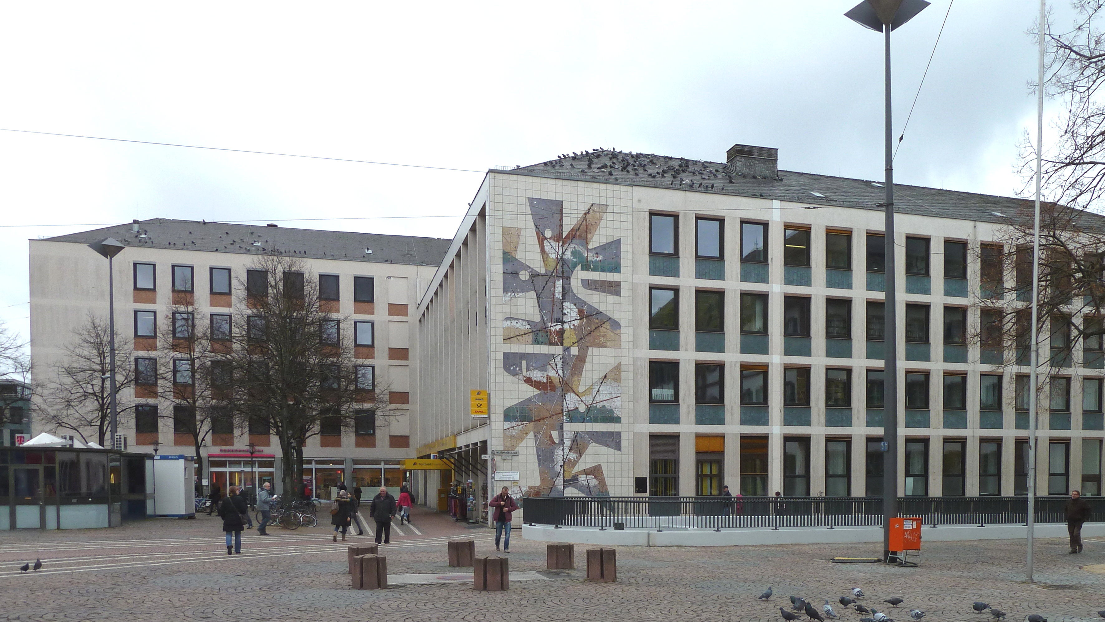 Darmstadt, Wilhelminenhaus, Regierungspräsidium, Dienstgebäude Wilhelminenstraße 1 - 3, ehemals Posttechnisches Zentralamt